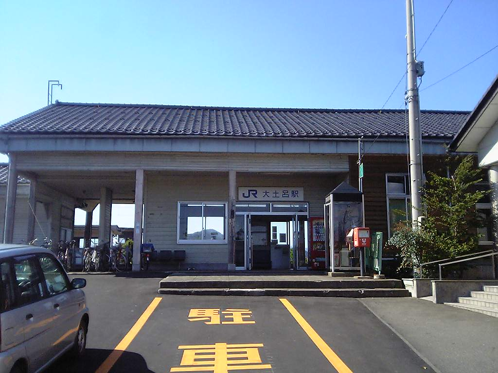 大土呂駅駅舎（2009/10/12撮影）